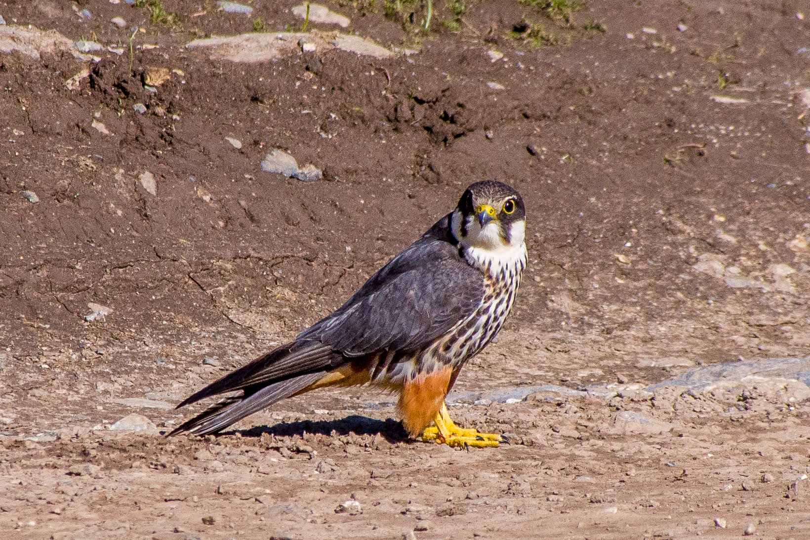 Eurasian Hobby